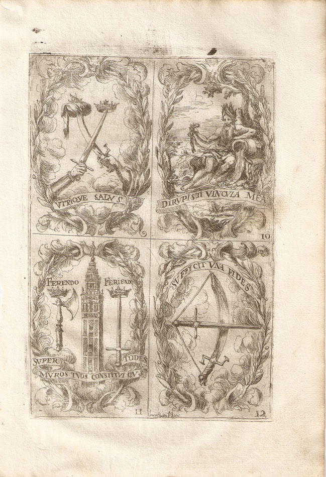 Utruque salus/ dirupisi vinculame/ Super muros tuos constitucus/ suficit una fides. De Fiestas de la Santa Iglesia Metropolitana y Patriarcal de Sevilla, 1671, Fernando de la Torre Farfán.